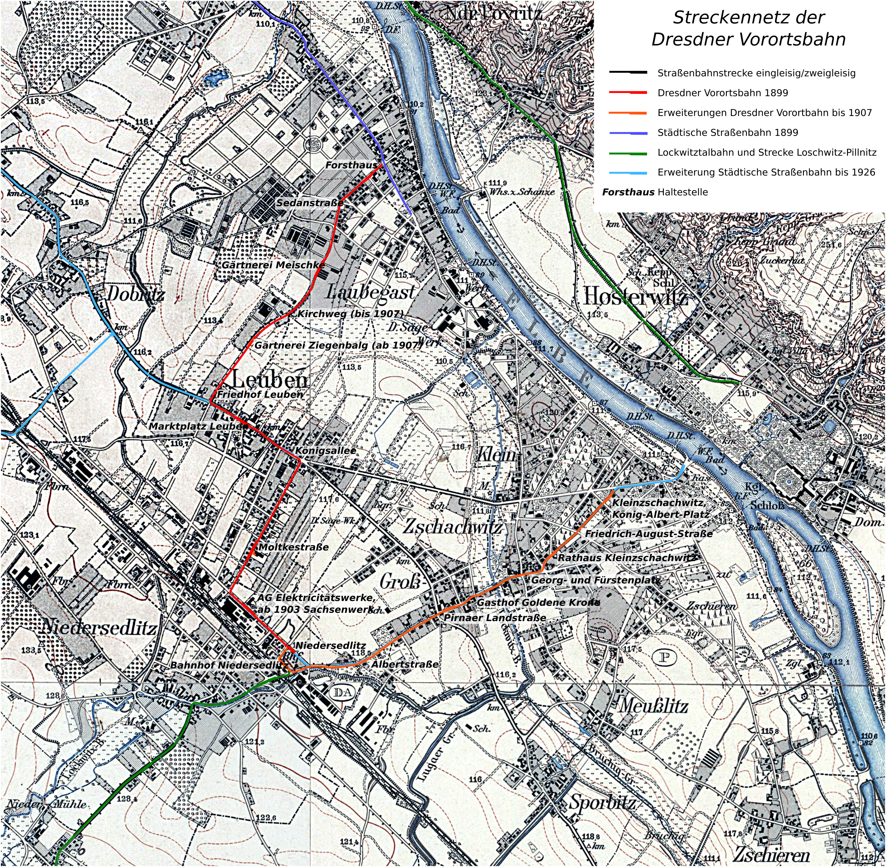 Streckennetzplan der Dresdner Vorortbahn. Quelle ist im wesentlichen Mario Schatz: Meterspurige Straßenbahnen in Dresden, Verlag Kenning 2007, ISBN 3933613760